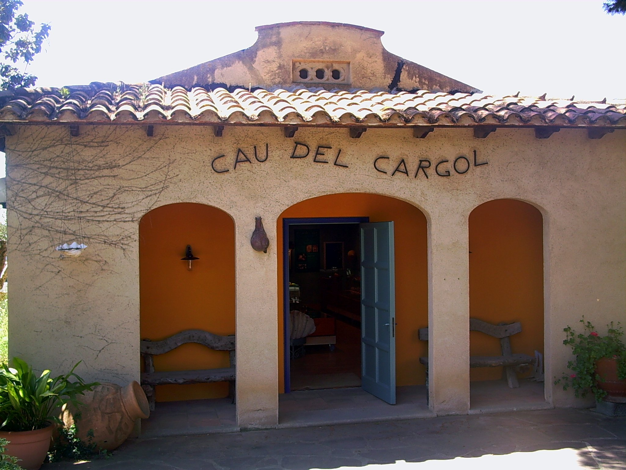 Museu del Cau del Cargol, a Vilassar de Dalt, al Maresme, (Catalunya).